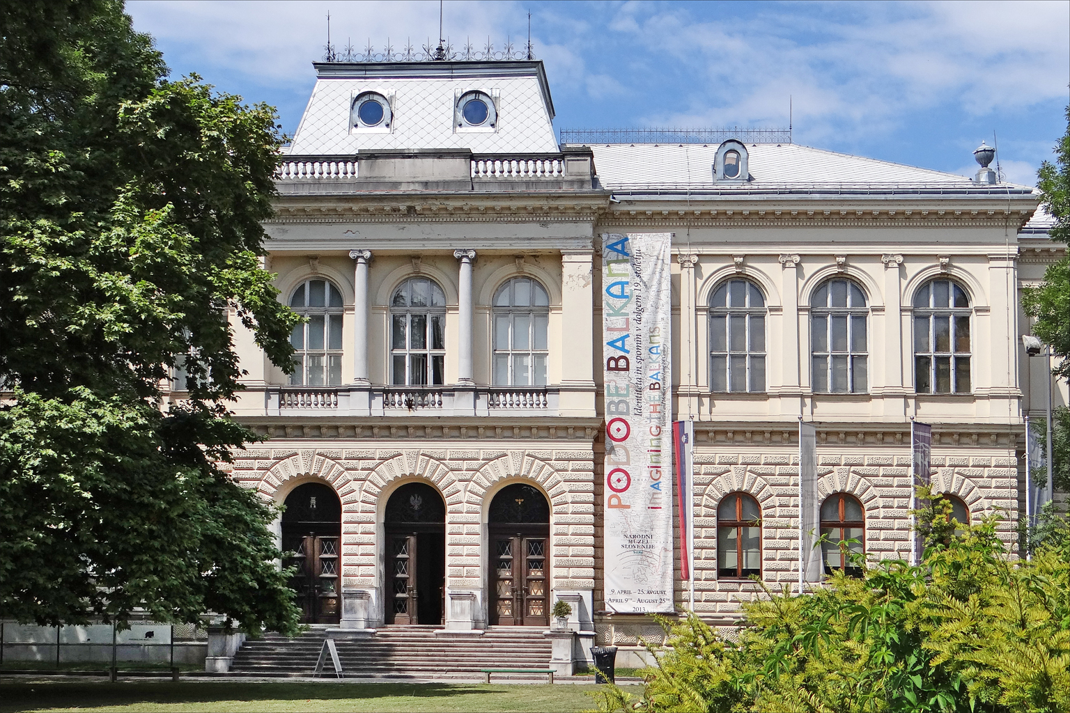 Façade du musée national de Slovénie Le bâtiment date de 1885. Il a été conçu par l'architecte Vladimir Hrasky Son objet le plus célèbre est la flûte du Néanderthal datant de 55.000 ans trouvée dans une grotte des Alpes Site du musée national de Slovénie